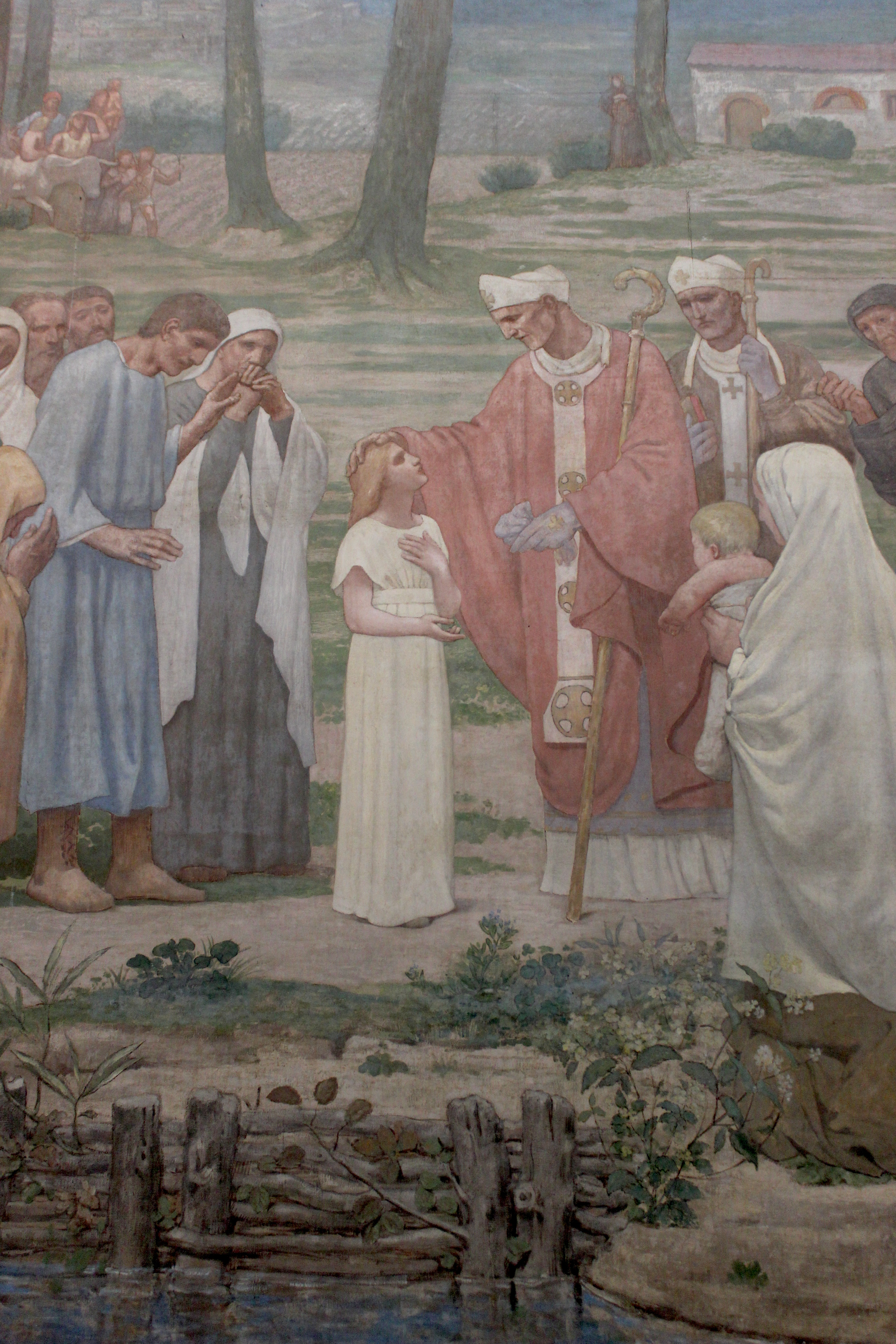 París. Panthéon. Escenas de la vida de Santa Genoveva. Pierre Puvis de Chavannes.